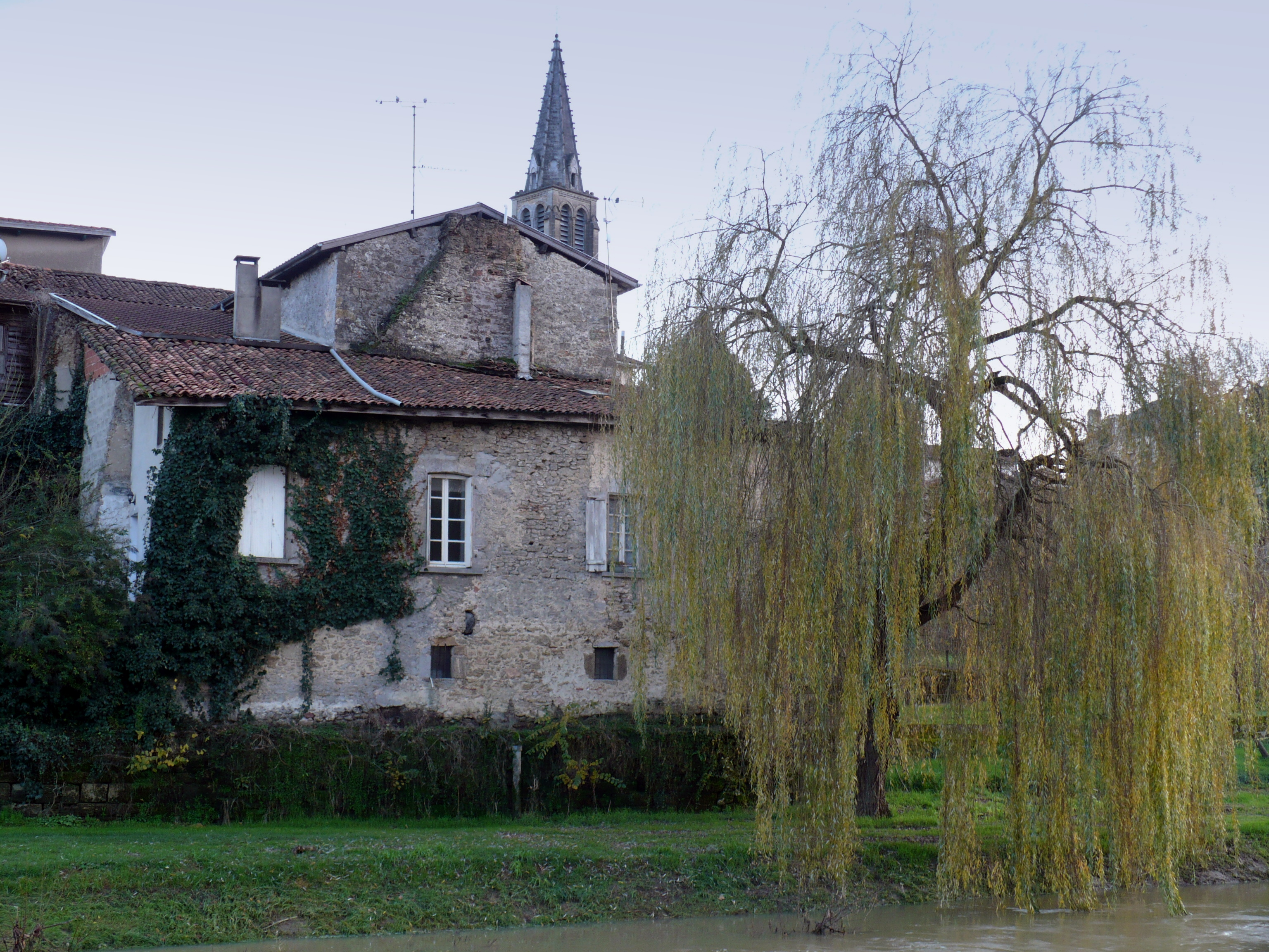 Eglise de Tartas